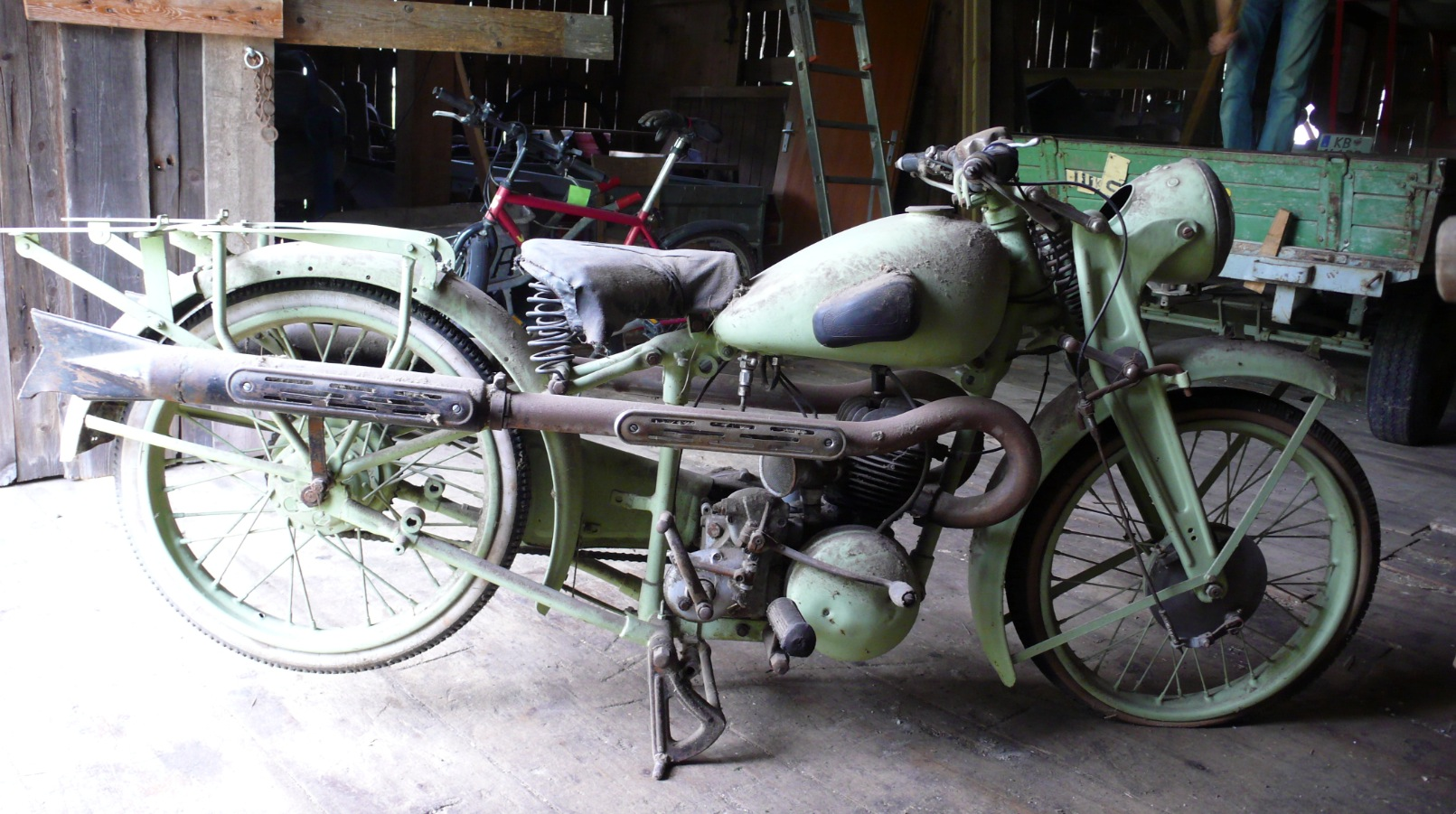 Phönix RMW Luxus 250 cm3 Motorrard